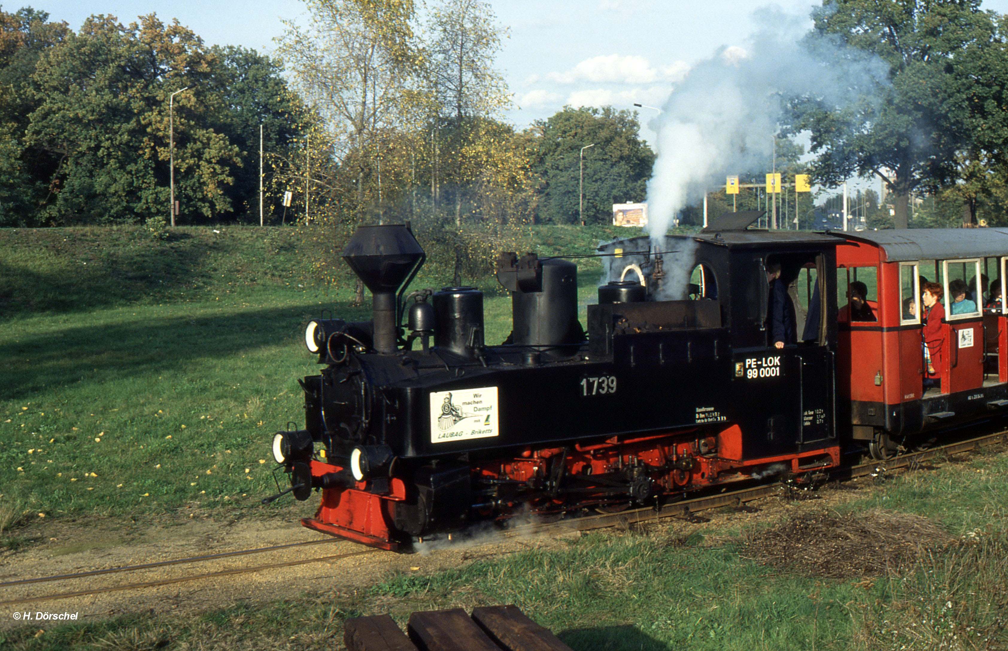 1993-Lok 01